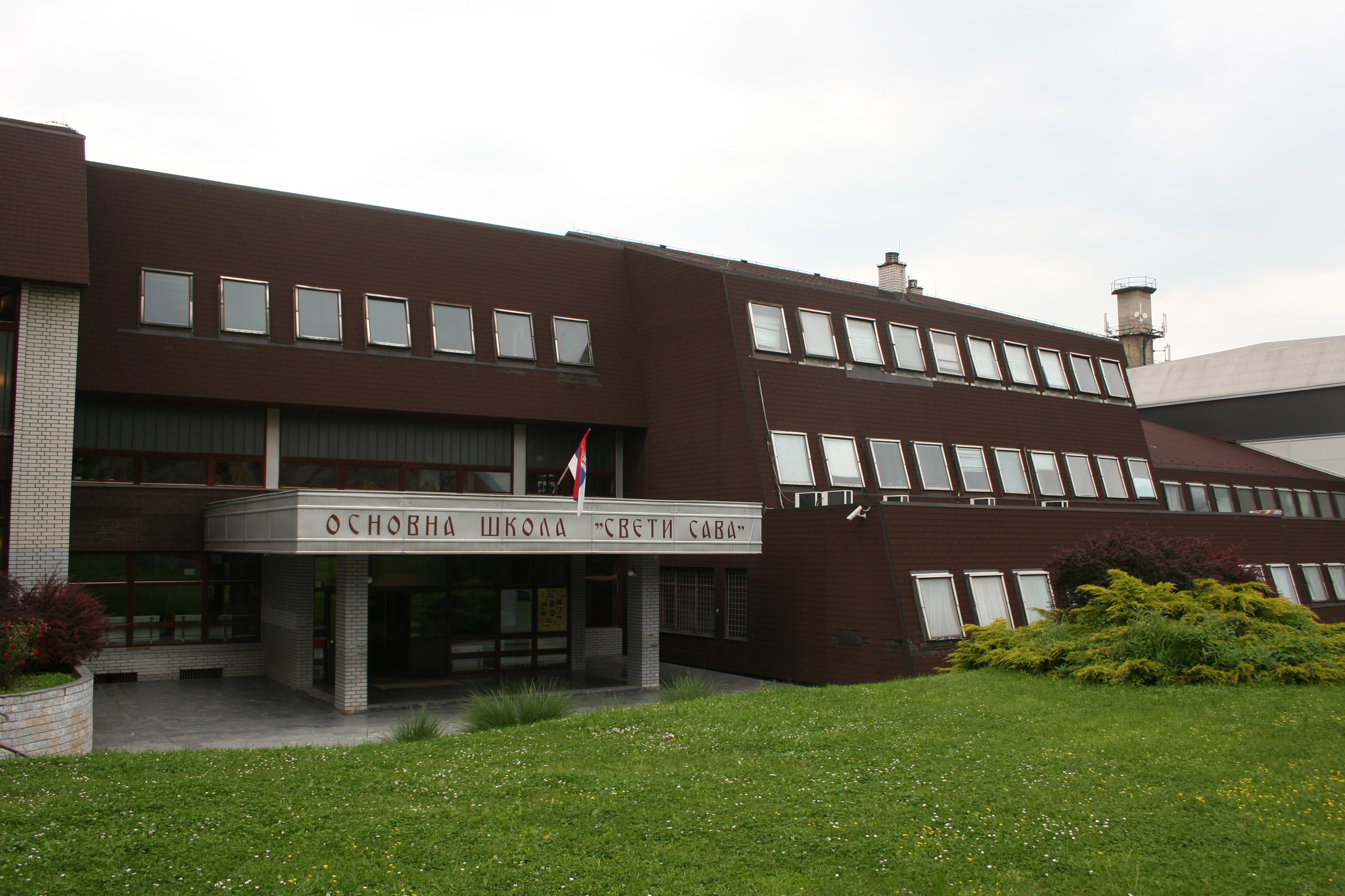 Bajina Bašta u maju 2017.